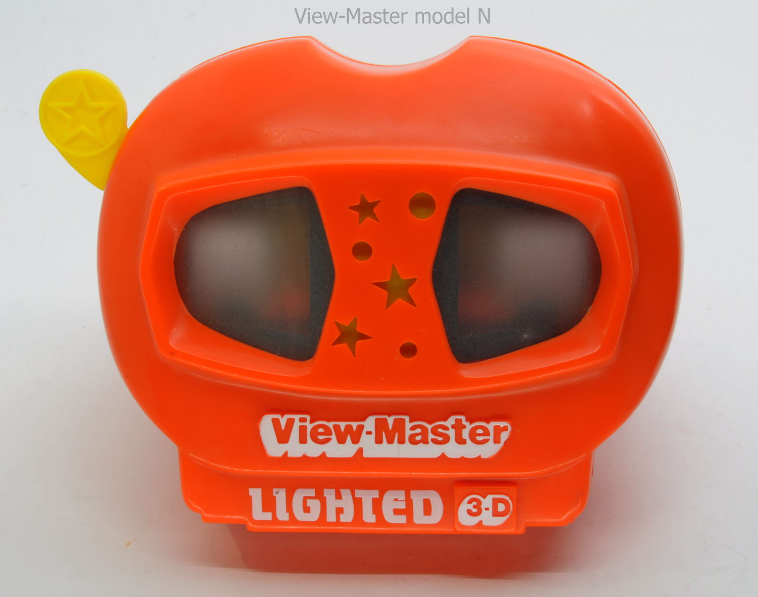 วิว-มาสเตอร์ โมเดล เอ็น(N) สีส้มสด คล้ายฟักทอง หรือหัวกระโหลก 1991 View-Master Ideal Group Inc., a subsidiary of Tyco industries, inc., Made in China